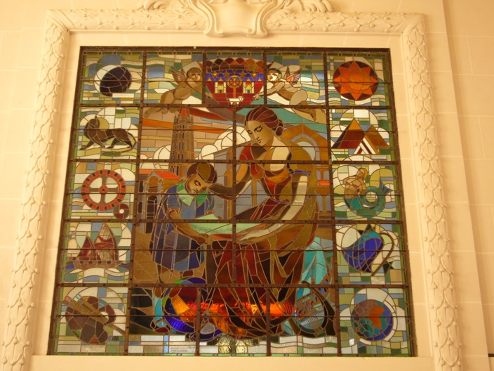 Bibliothèque d'Etude et du Patrimoine, Toulouse.